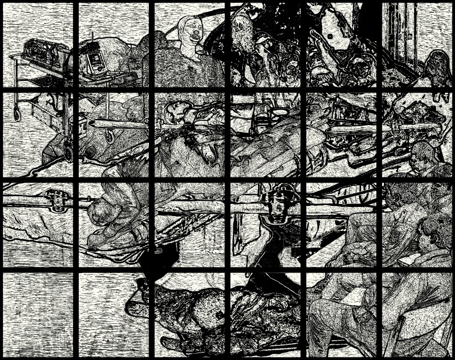 Kunstwerk des Künstlers Thomas Rissler Titel: "Der Schlaf", 2009, Holzschnitt